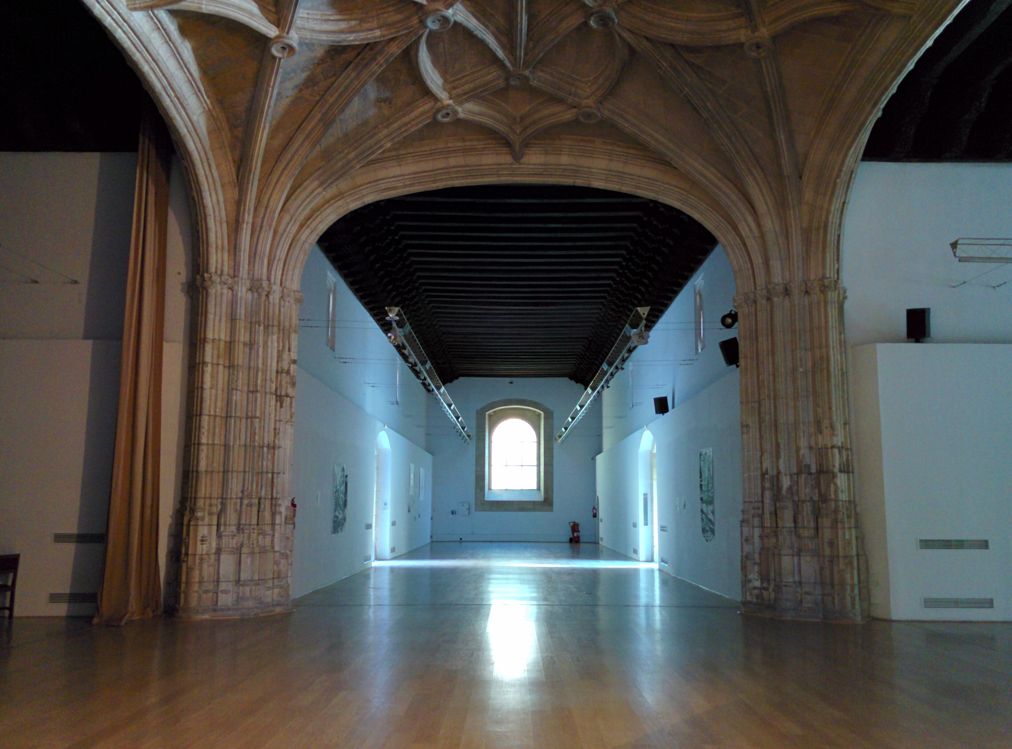 Jornada de Patrimonio Abierto en la Universidad de Granada, con OSL-UGR y WMES.